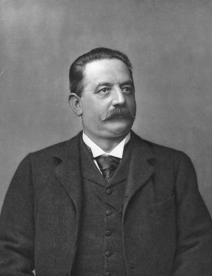 Ferdinand Tiemann (* 10. Juni 1848 in Rübeland; † 14. November 1899 in Meran, Italien)